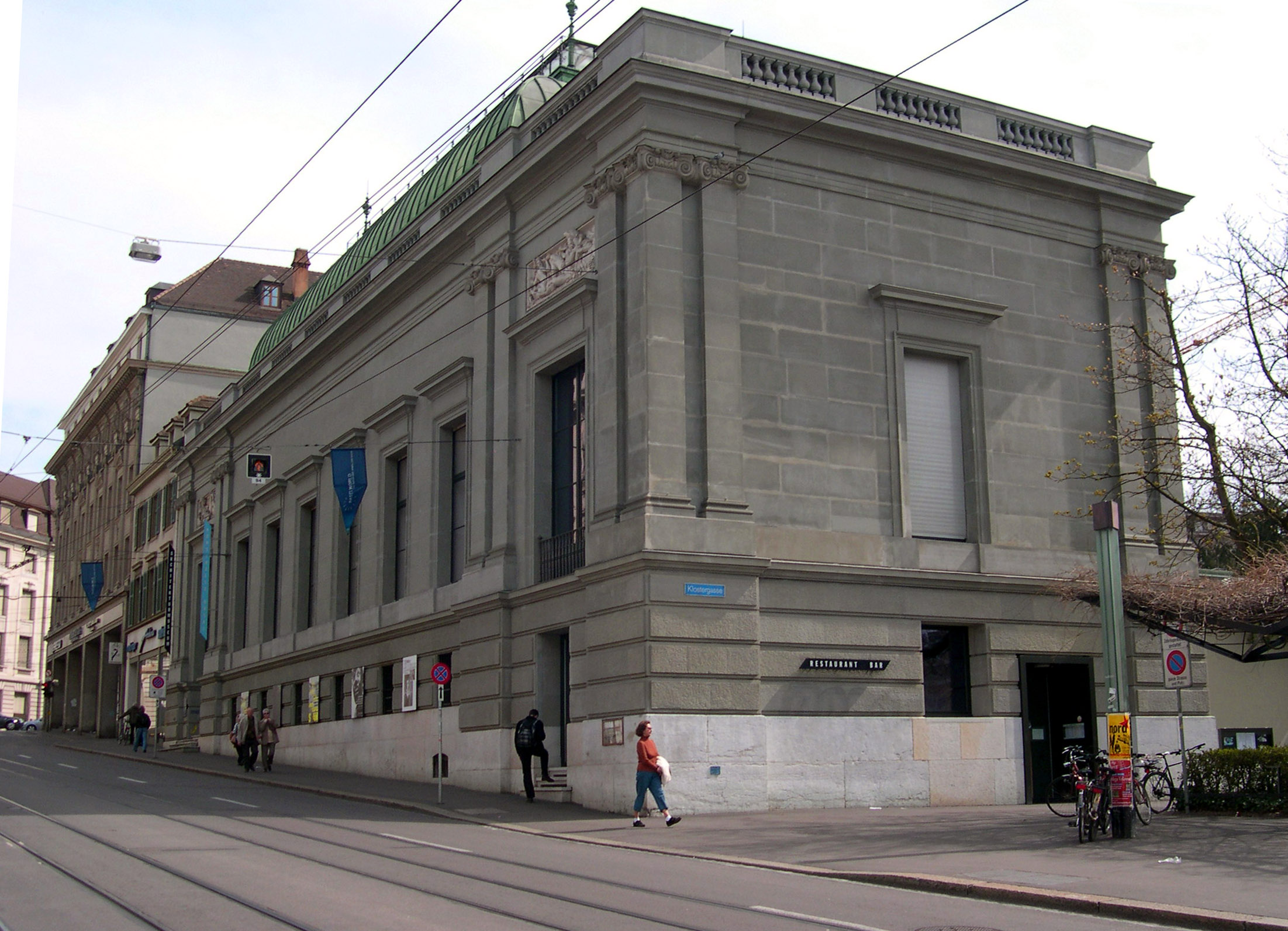 Kunsthalle Basel, Strassenseite zum Steinenberg, Domizil des Schweizerischen Architekturmuseums.